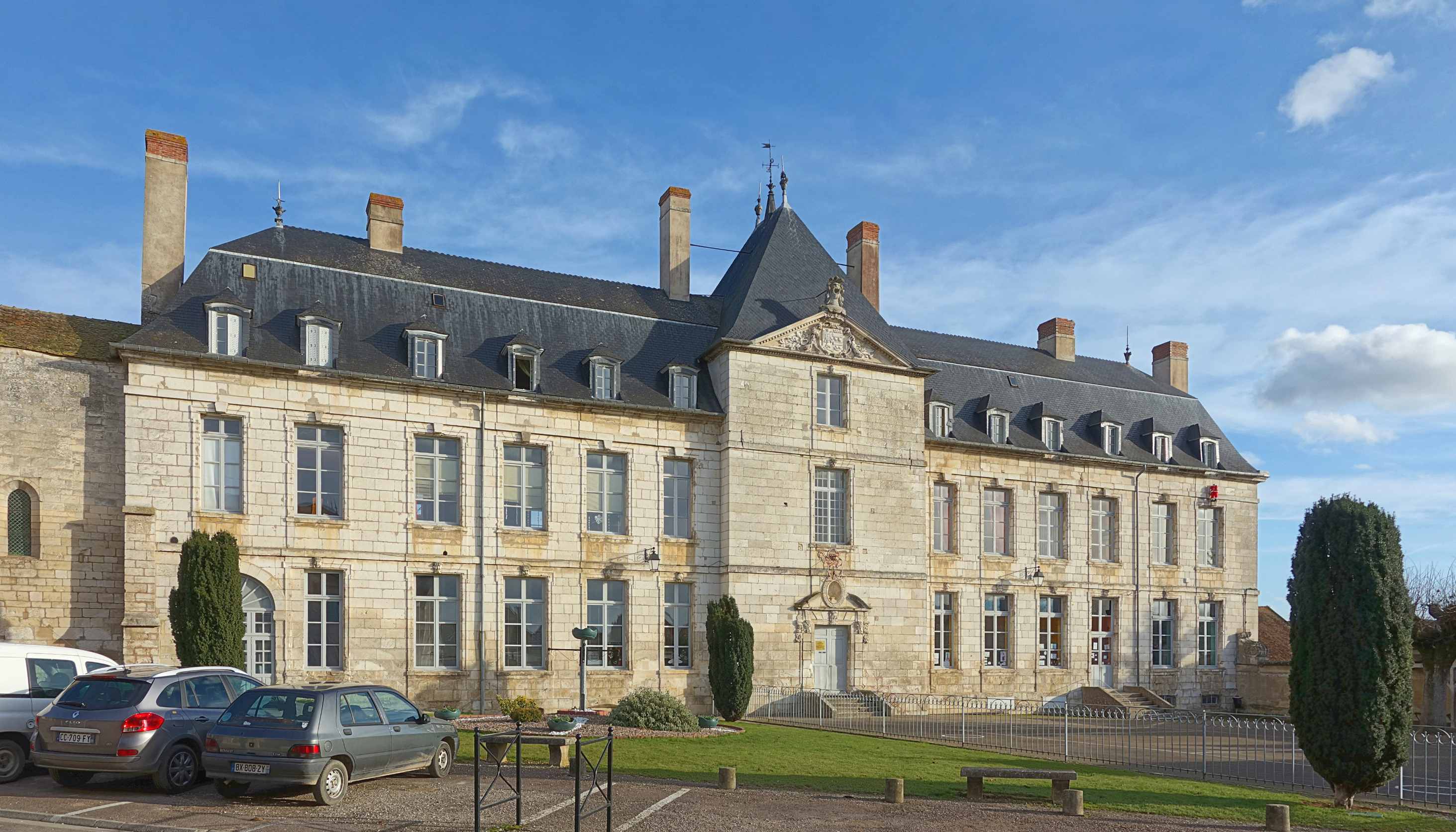 La mairie de Saint-Bris-le-Vineux.